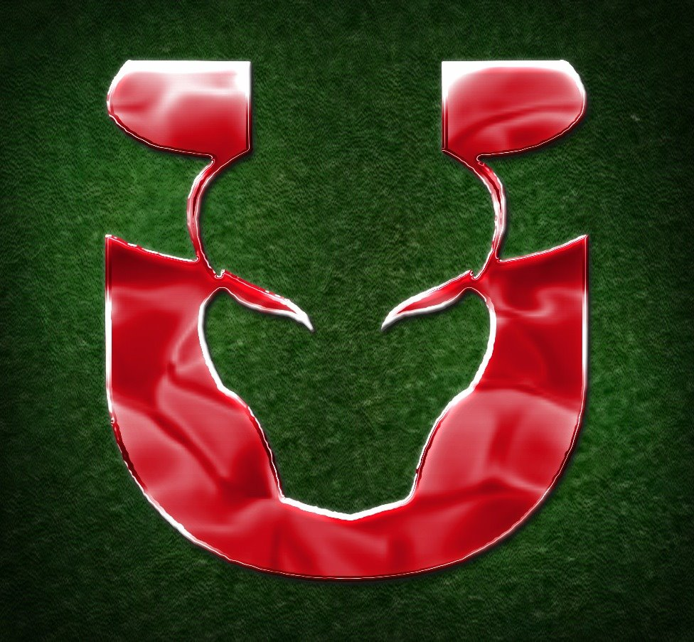 Logo Bullfight 2018